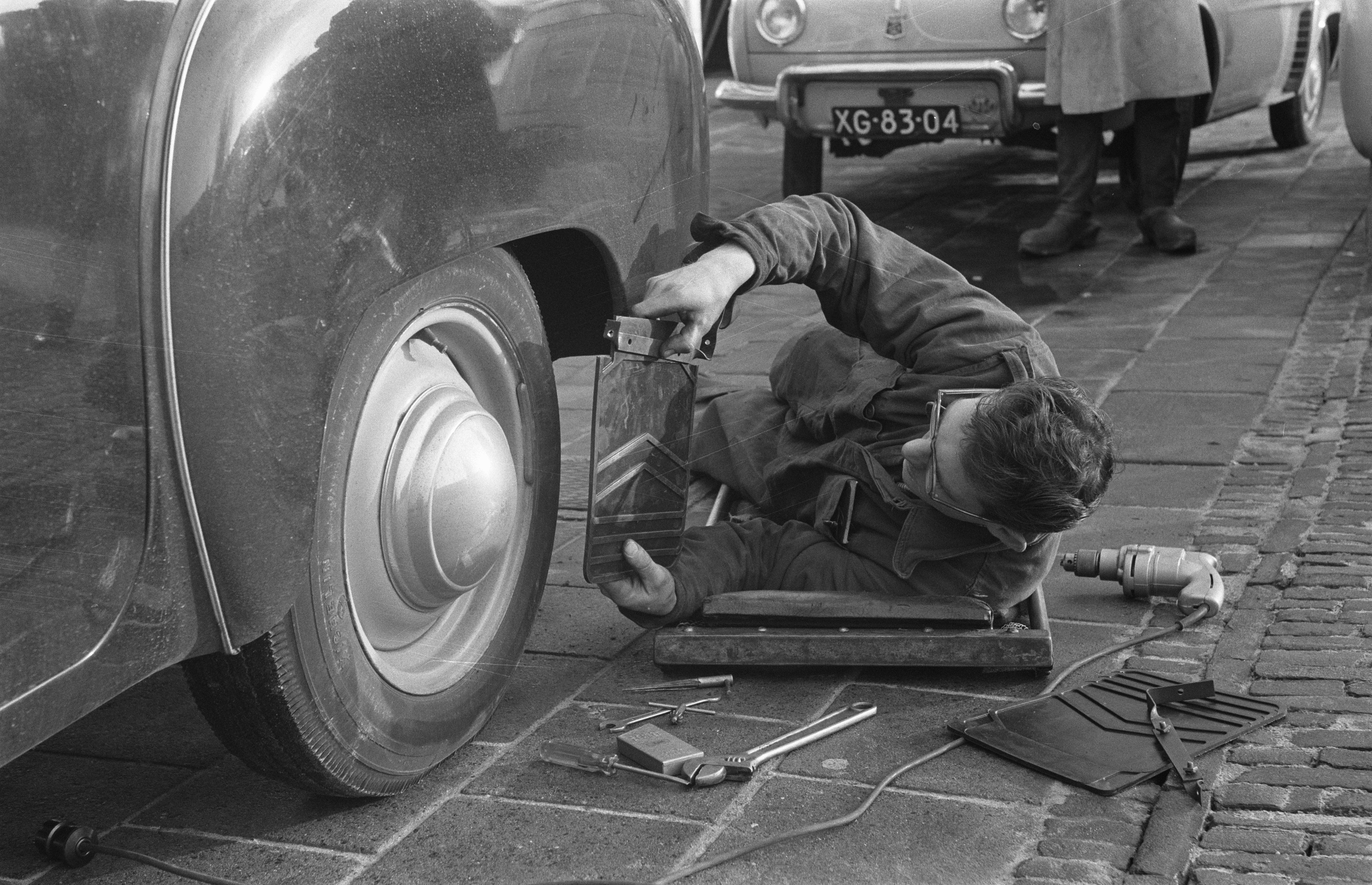 Collectie / Archief : Fotocollectie Anefo Reportage / Serie : [ onbekend ] Beschrijving : Monteren van spatlappen aan autos Datum : 21 december 1959 Trefwoorden : SPATLAPPEN, auto's Fotograaf : Pot, Harry / Anefo Auteursrechthebbende : Nationaal Archief Materiaalsoort : Negatief (zwart/wit) Nummer archiefinventaris : bekijk toegang 2.24.01.05 Bestanddeelnummer : 910-8909